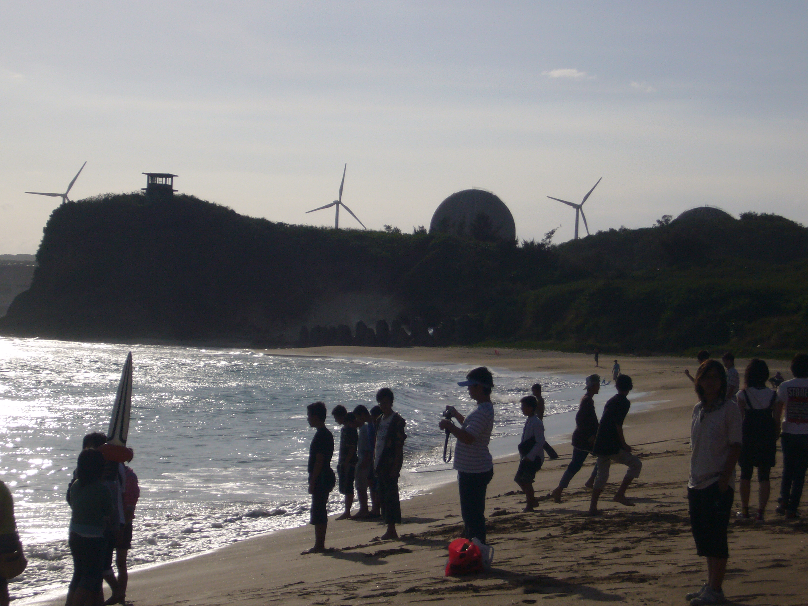 第三核能發電廠與南灣